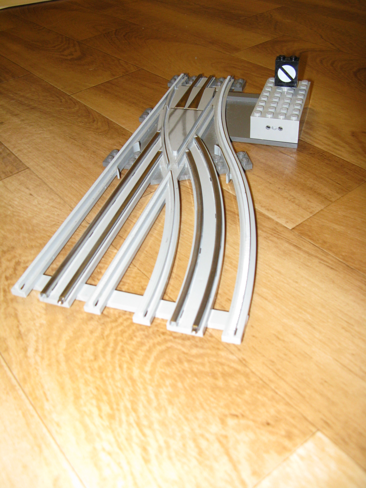 Sporveksler av lego.